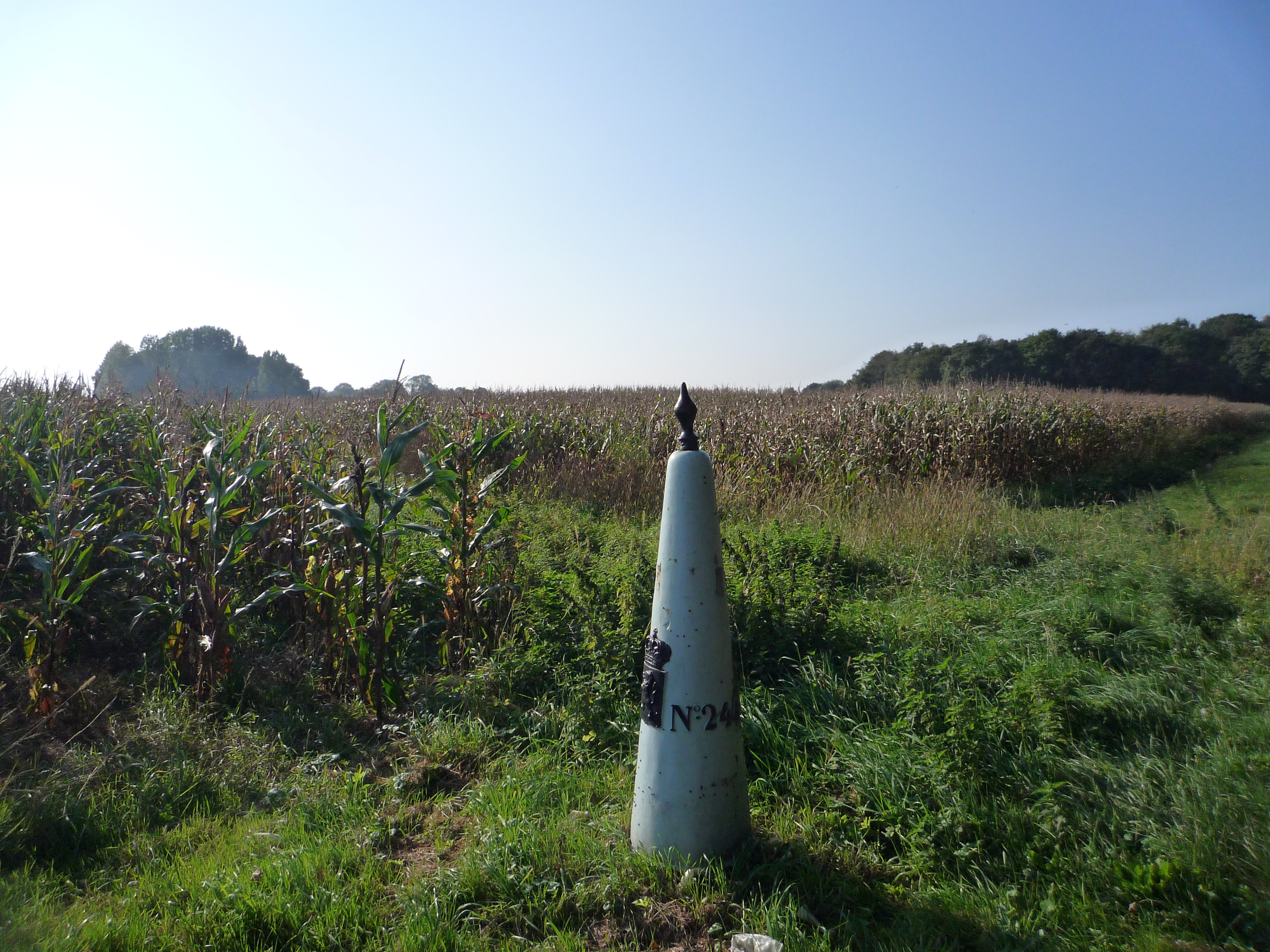 20101009 39 Hoek